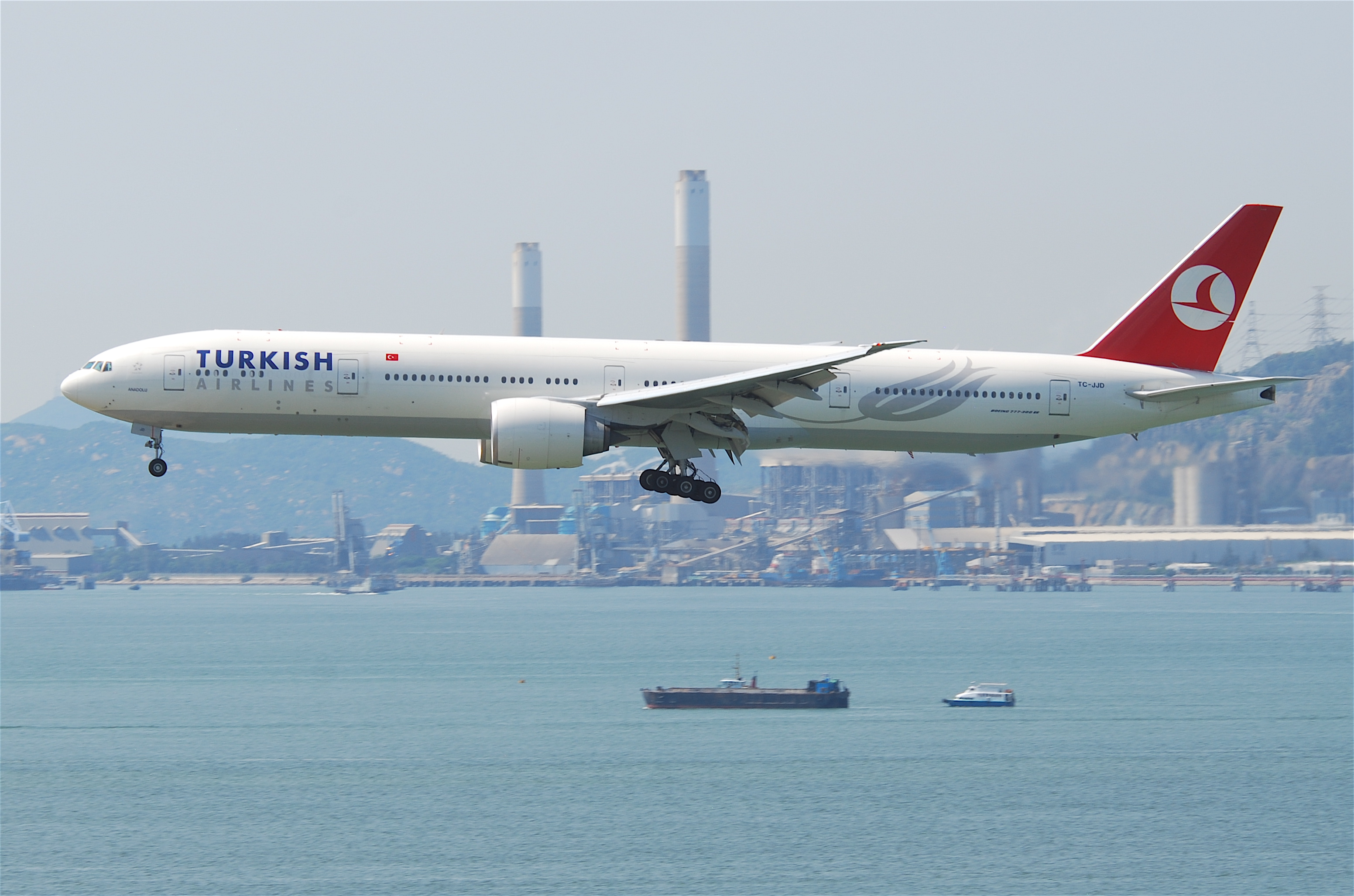 Turkish Airlines Boeing 777-300ER; TC-JJD@HKG;04.08.2011/615vb